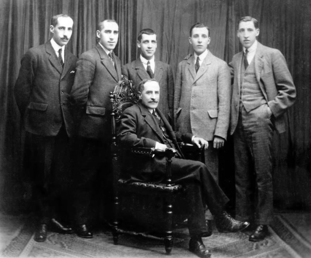 Eugenio Carré Aldao cos seus fillos, de esquerda a dereita: Gonzalo, Leandro, Eugenio, Luis e Carlos Carré Alvarellos. (Arquivo Carré)